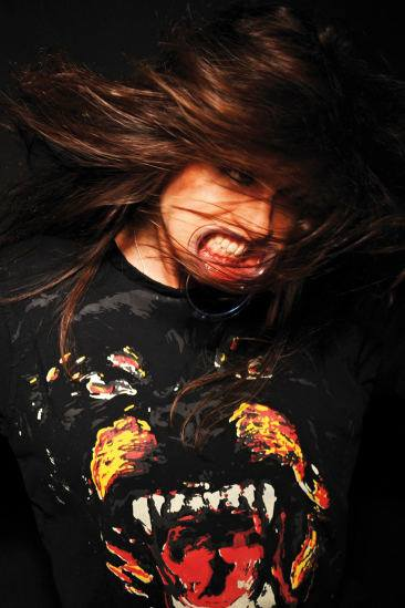 Niels Ruf - Bitte Recht Freundlich